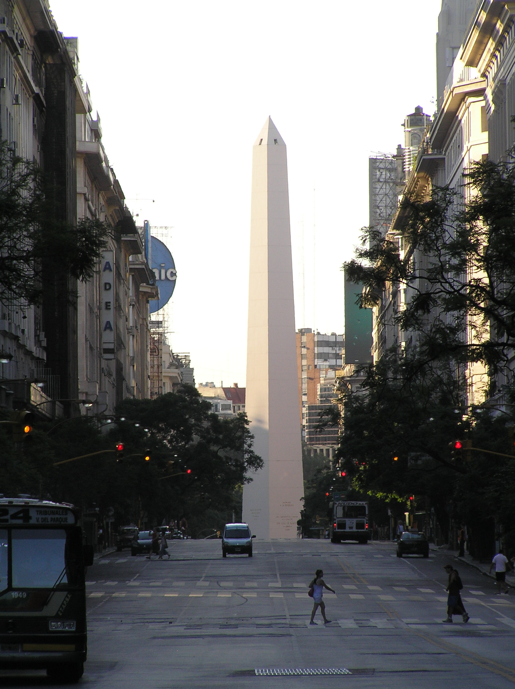 Vista del Obelisco desde la Plaza de Mayo (Diagonal Roque Sáenz Peña, Buenos Aires).